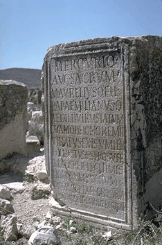 Inscription latine de Diana Veteranorum (Zana, Algérie). Dédicace d'une base de statue consacrée à Mercure par un notable municipal (Aurelius Aemilianus). Référence : CIL VIII, 4579.